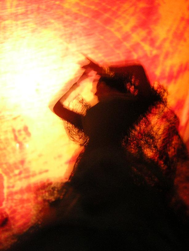 Flamenco dance